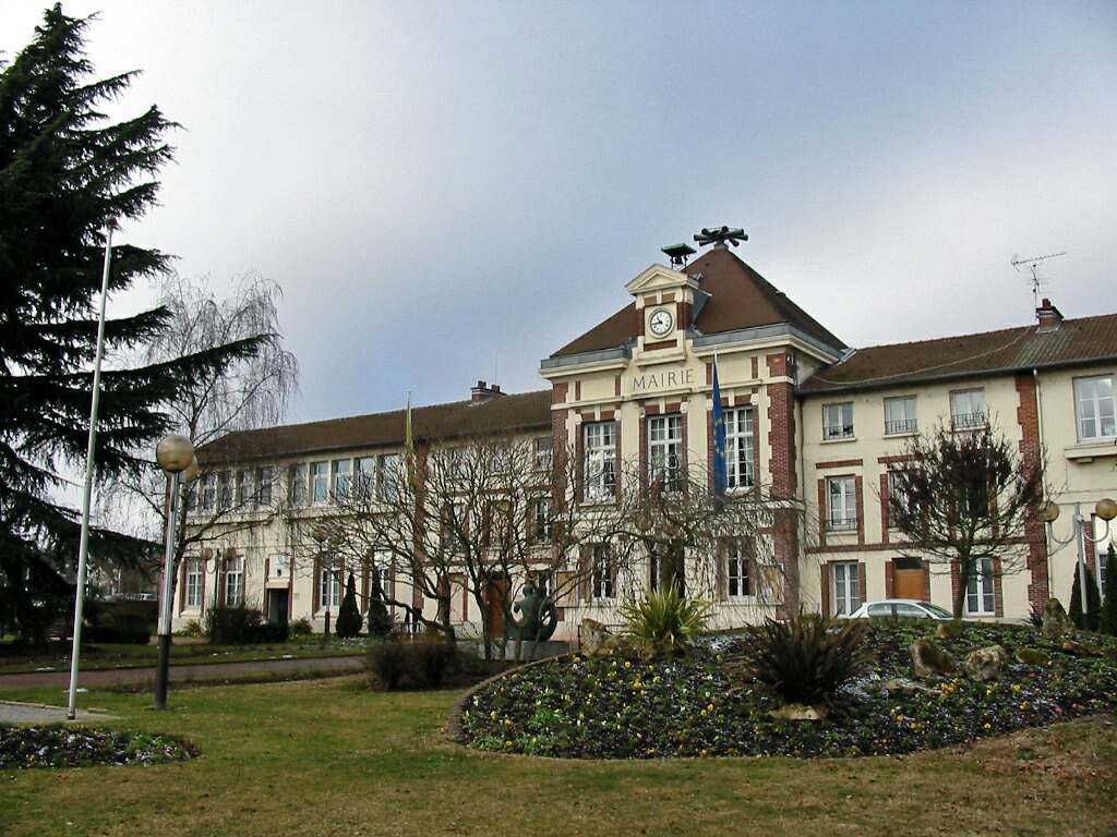 Mairie de Mantes-la-Ville (Yvelines) Photo personnelle, mars 2006 Licensing Mantes-la-Ville Catégorie:Image de Mantes-la-Ville